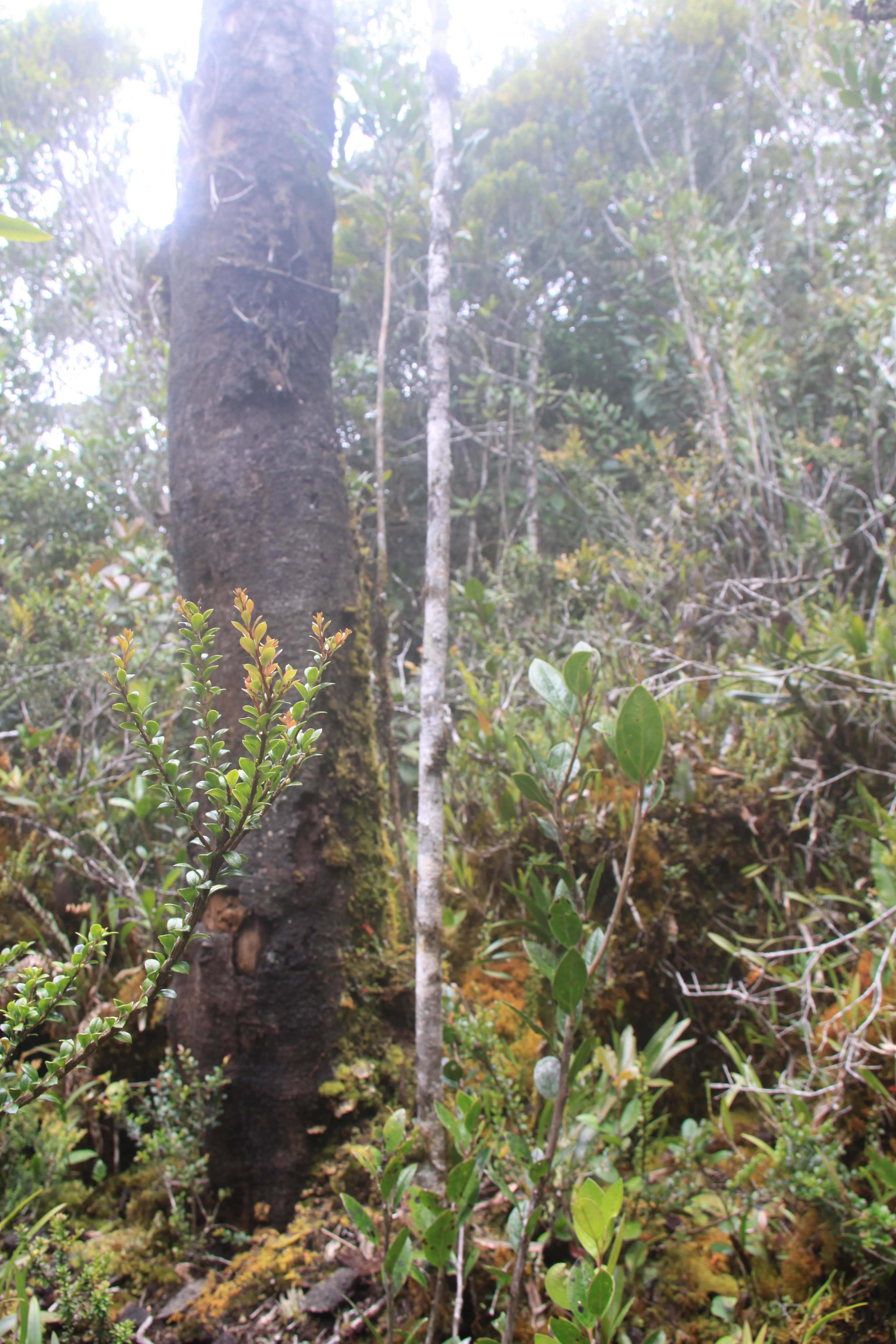 Indonesia, N-Sumatra, Aceh: Mt. Leuser NP (E-slope of Mt. Kemiri), ca. 2700-3000m asl., 16.04.2009 IMG_4760